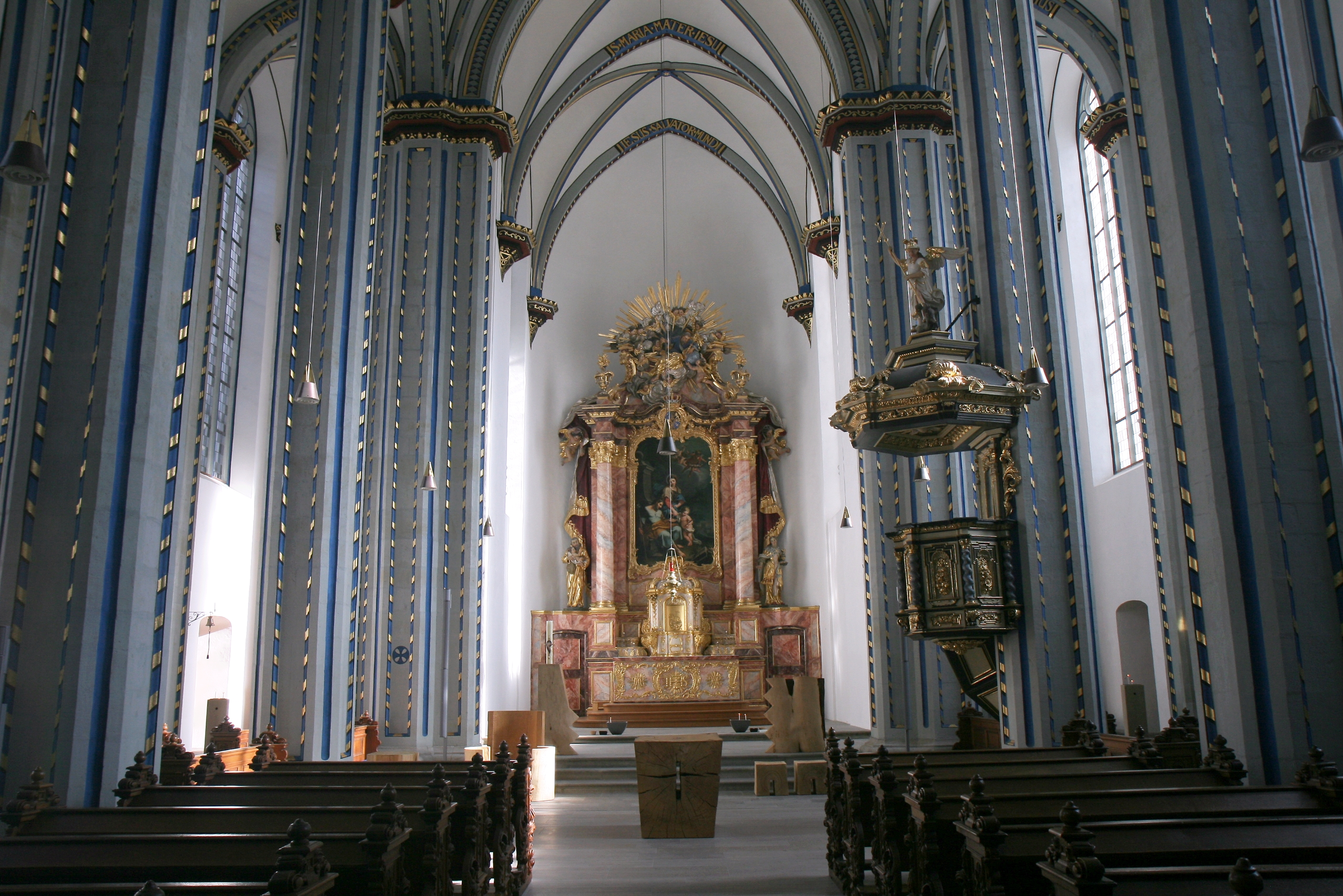 Alt-katholische Namen-Jesu-Kirche (ehemalige Jesuitenkirche), Bonngasse 8 in Bonn. This is a photograph of an architectural monument. 204